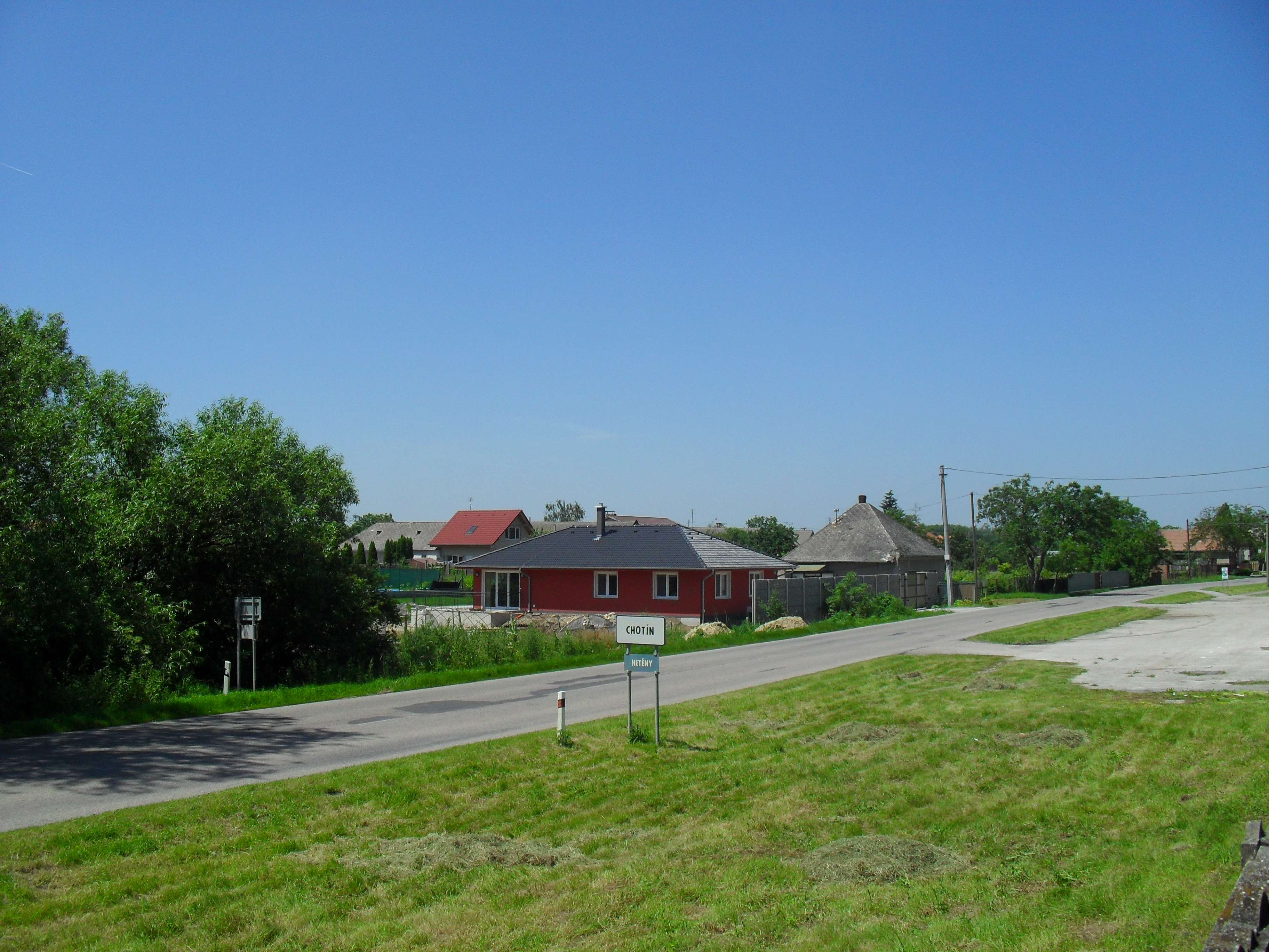 Hetény - a Marcelháza-Hetény országút a falu szélénél